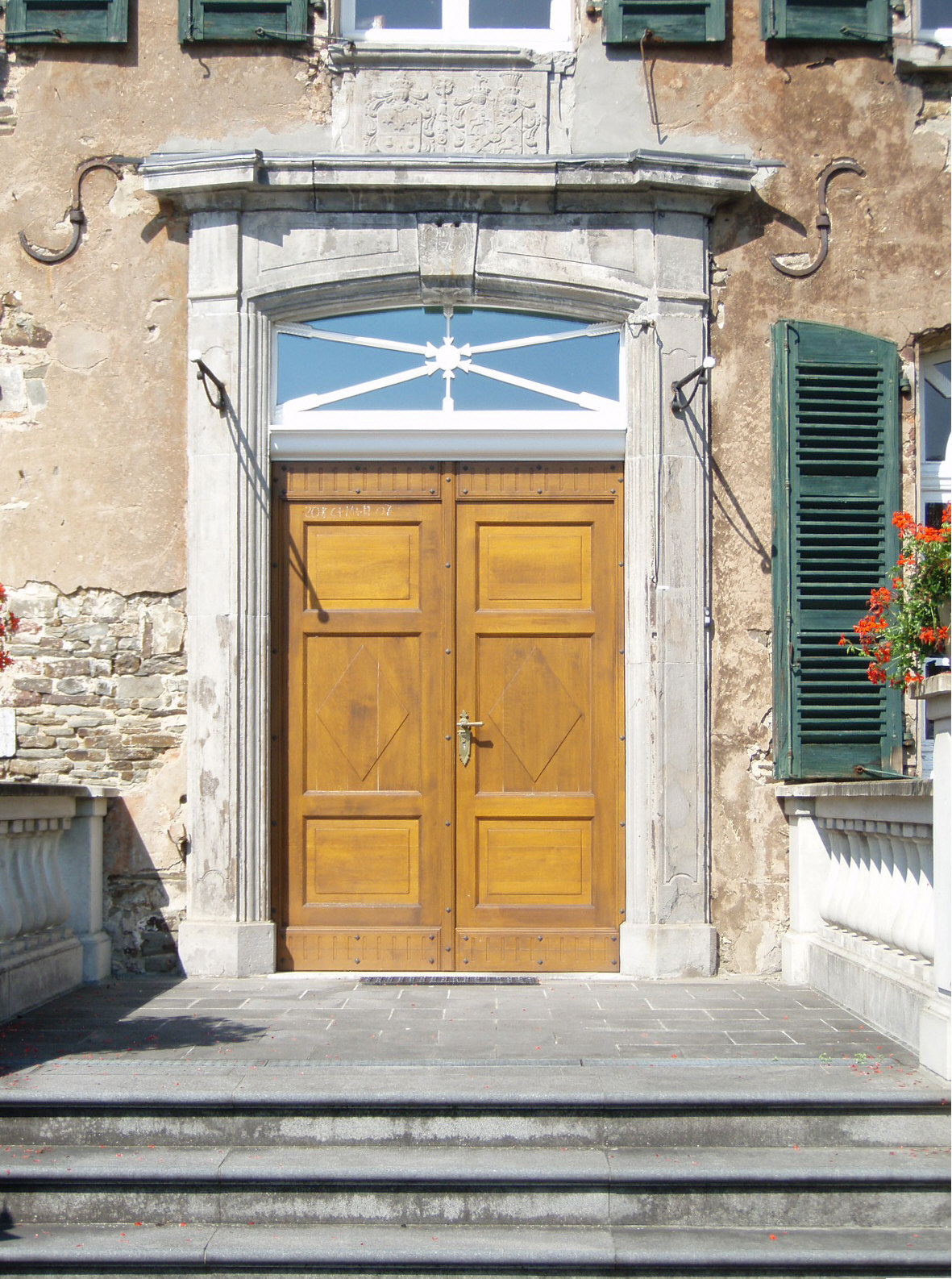 Eingangstür des Schlosses Linnep mit Wappen